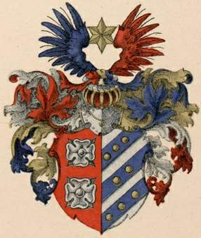 Wulfsdorffi suguvõsa aadlivapp